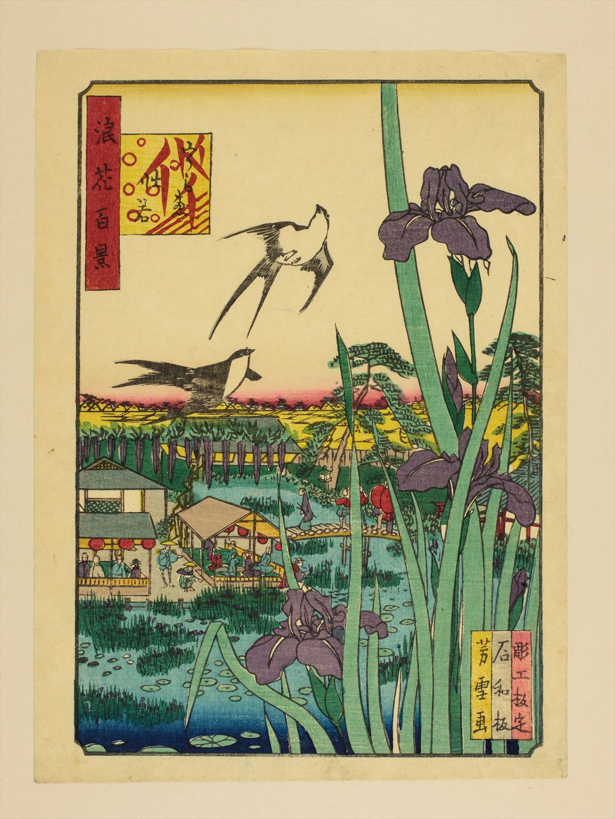 1800年代。南粋亭芳雪/画。浪花百景 102枚のうちの1枚。大阪市立中央図書館蔵。